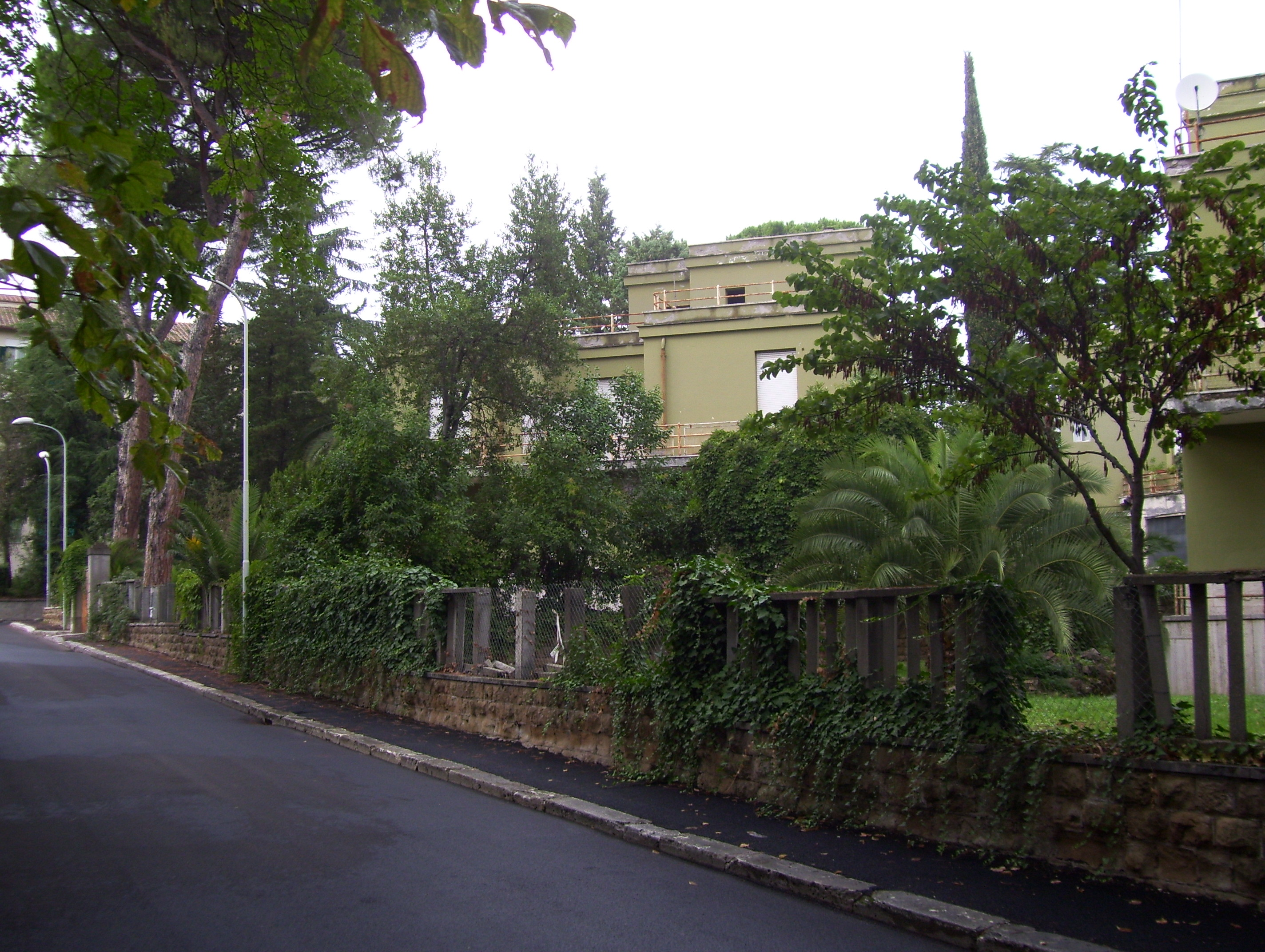 Residenze con giardino affidate nel 1937 agli Ufficiali dell'Aeroporto di Guidonia, Viale A. Ulivelli.